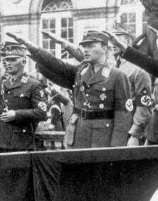 Title: Reichstreffen des Reichsbundes Volkstum und Heimat People in the image: Leeb, Wilhelm von Ritter: Generalfeldmarschall, Ritterkreuz (RK), Heer, 1942 entlassen, Deutschland (GND 118570870) *Hessen, Philipp von: Politiker (NSDAP) Factual corrections and alternative descriptions are encouraged separately from the original description. Additionally errors can be reported at this page to inform the Bundesarchiv. Original historic description: ADN-ZB/Archiv Deutschland 1933: Reichstreffen des Reichsbundes Volkstum und Heimat in Kassel. Unter den offiziellen Gästen sind Prinz Philipp von Hessen 1.R.2.v.r. und Generalleutnant Wilhelm Ritter von Leeb 1.R1.v.r.